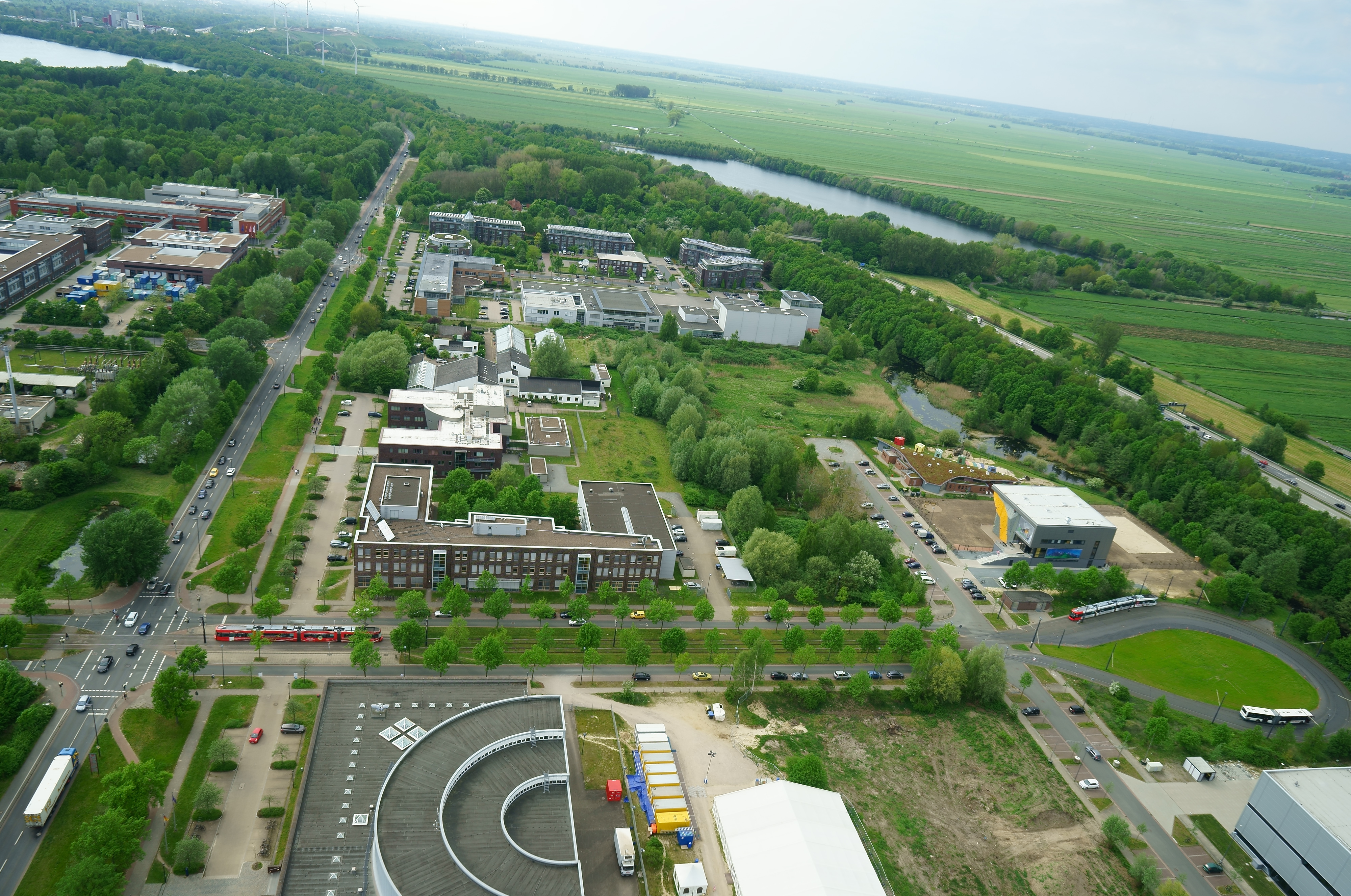 Standort: Fallturm des ZARM in Bremen, Fallturmspitze/Besucherebene (130 Meter): Technologiepark Bremen - Hochschulring Richtung Stadtwaldsee - Wendeschleife der Straßenbahnlinie 6 - BIBA - Stadtwaldsee - Bundesautobahn 27 - Kuhgrabensee - Blockland.